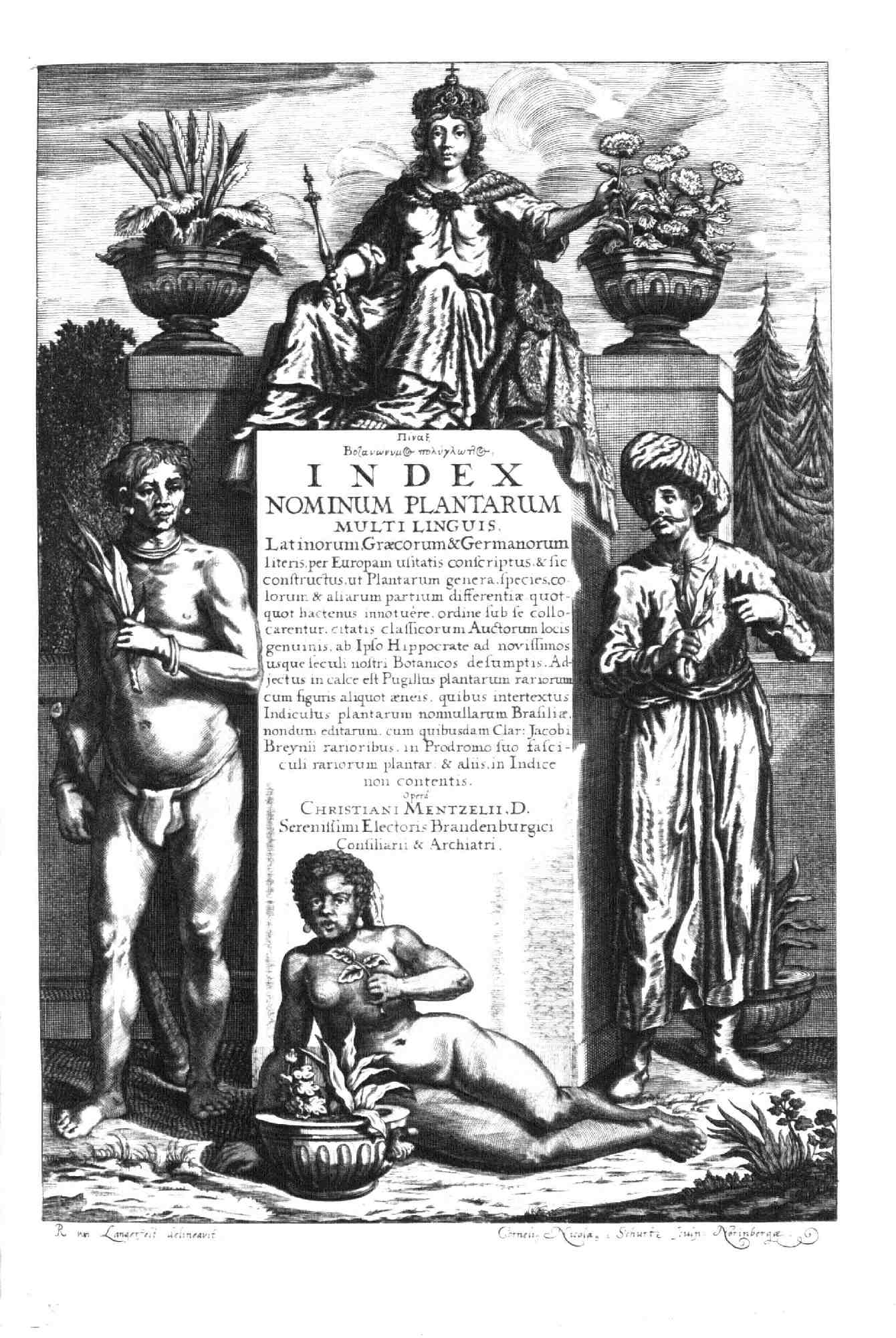 Frontispiz des Werks Index Nominum Plantarum Universalis von Christian Mentzel